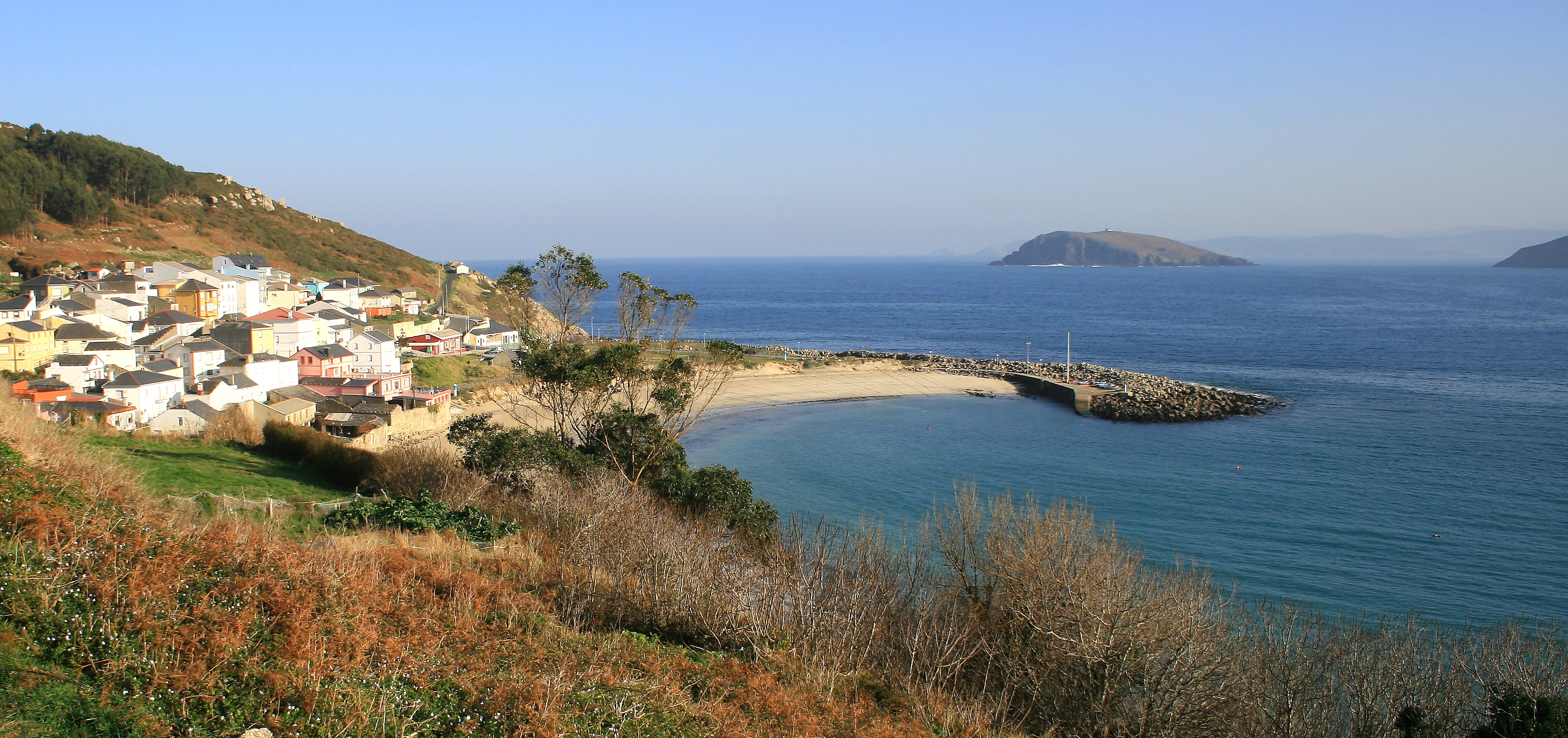 Vista do Porto de Bares, com o molhe pré-histórico (segundo Federico Maciñeira), e a ilha da "Coelleira" (coelheira) ao fundo